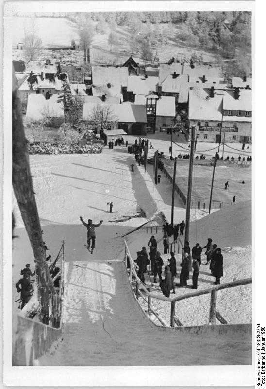 Wintersport im Erzgebirge in der Zeit vom 19.-22. Januar 1950 fand in Altenberg-Geising (Osterzgebirge) die sächsischen Wintersportmeisterschaften statt. UBz: Blick von der neuen Jugendschanze auf Geising. Rechts das Eis-Stadion. Aufn: Illus-Barbarino 5226-50 19